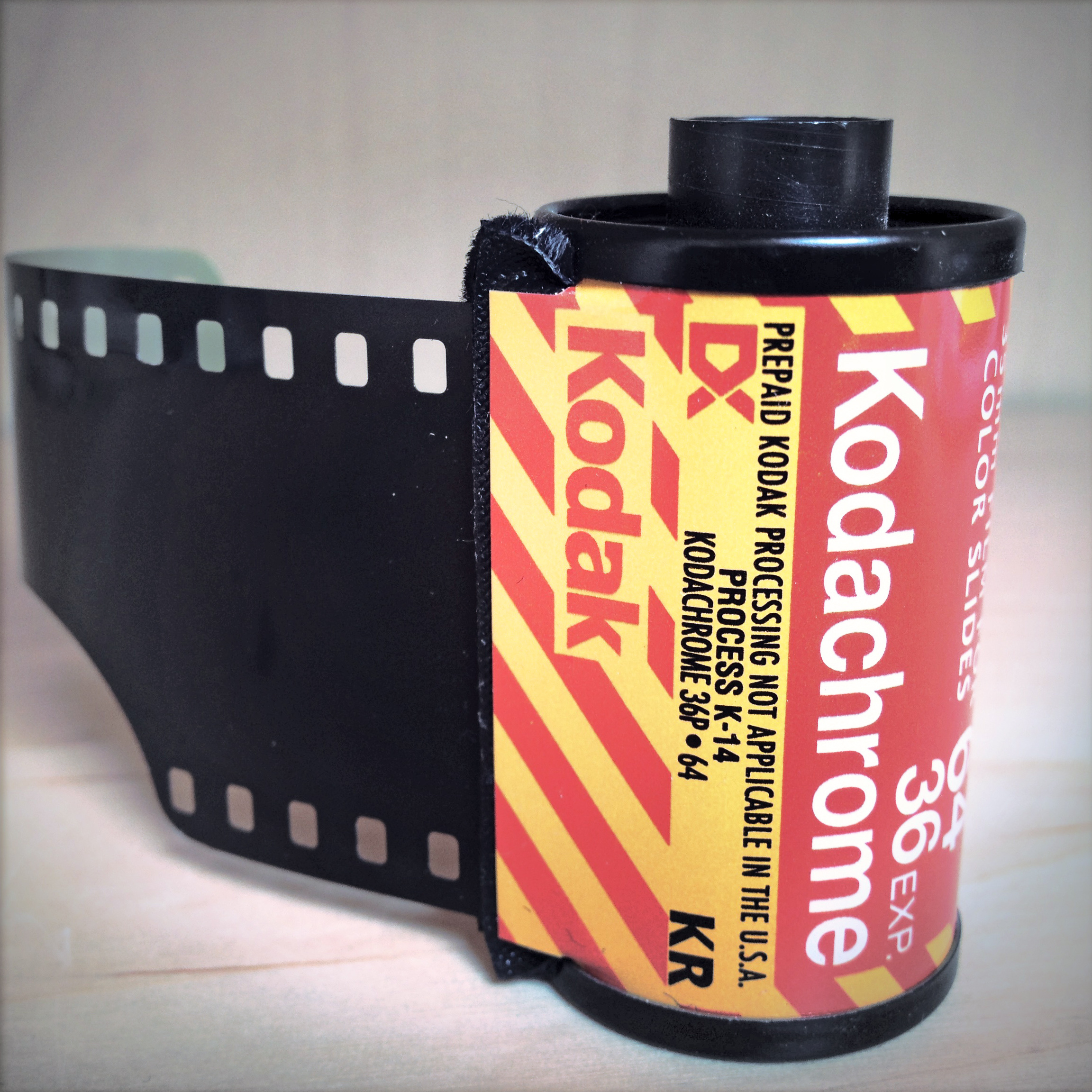 Kodachrome 64